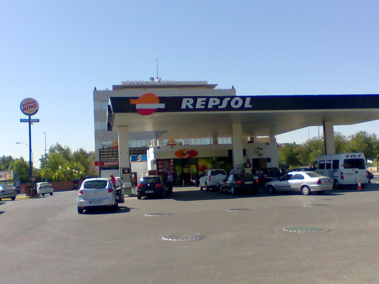 Estación de Servicio REPSOL en Sevilla